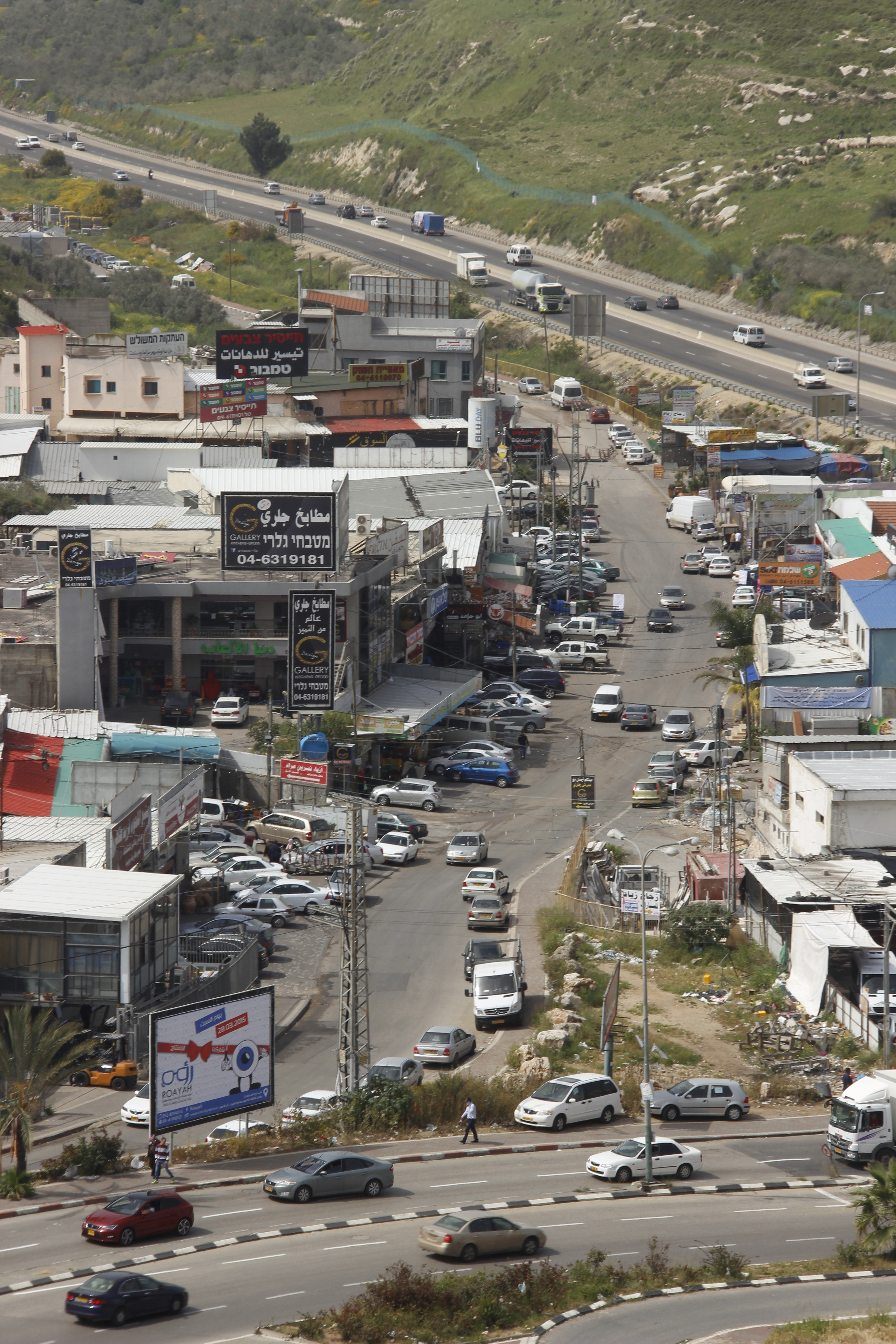 شارع السوق في مدينة أم الفحم